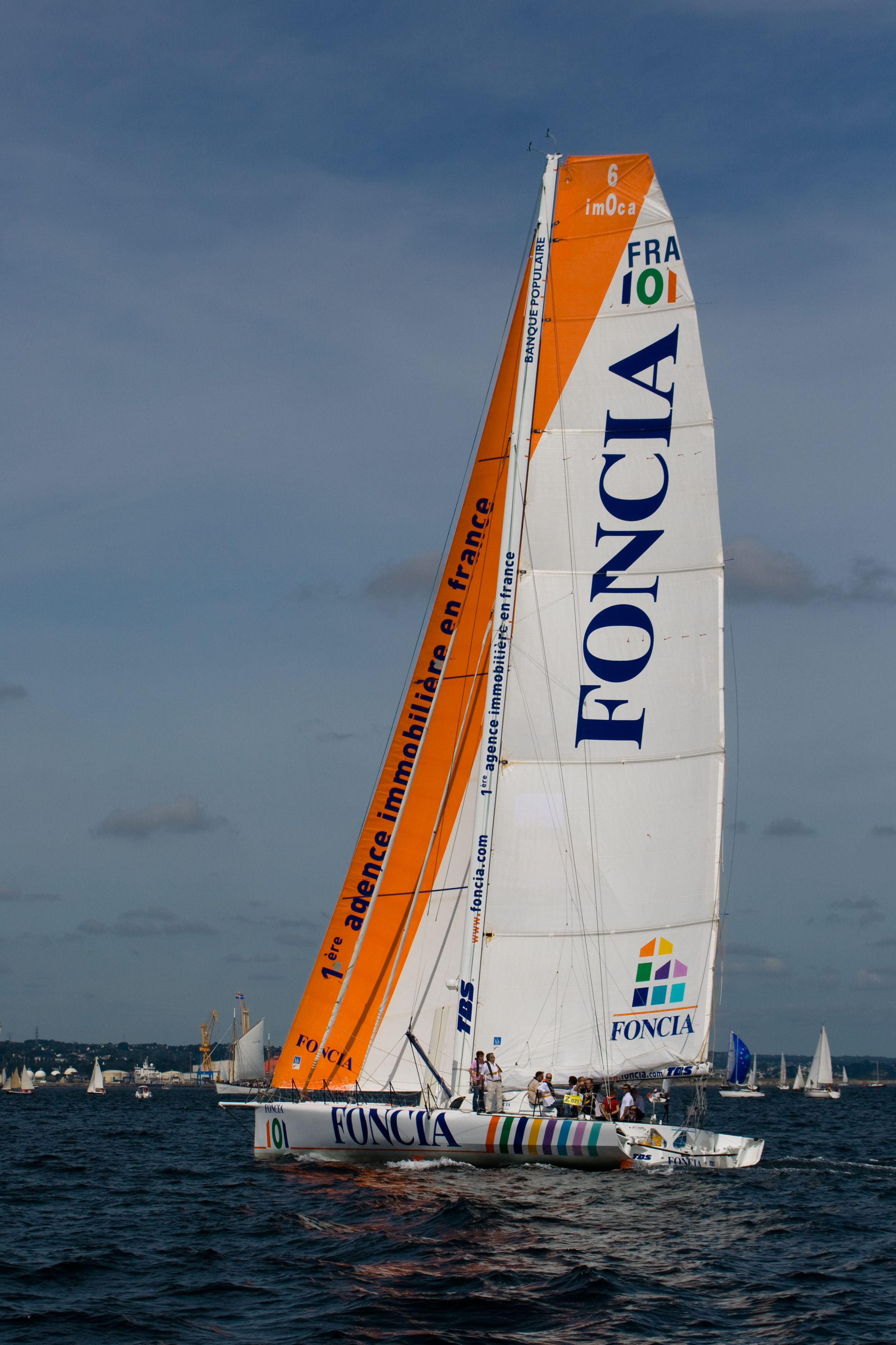 Monocoque Imoca Foncia de Michel Desjoyaux, Brest 2008.